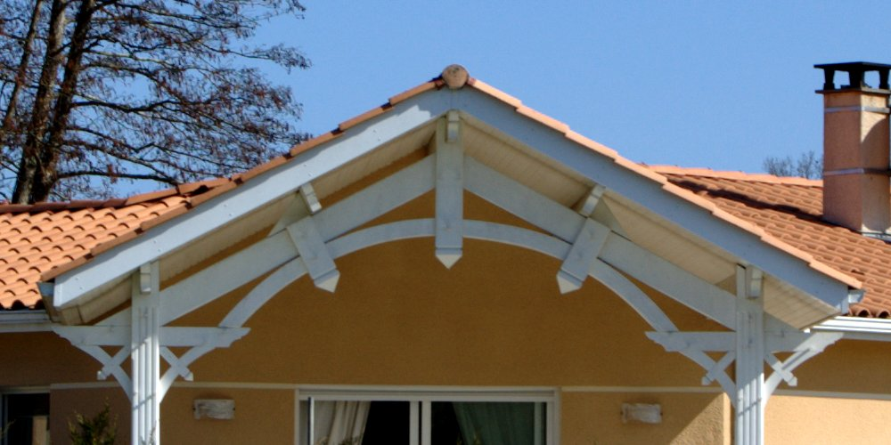 Interprétation moderne de l'estantat landais. Médoc.